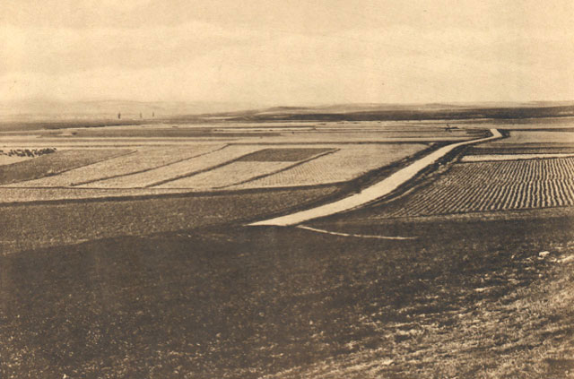 Campos de Villalar - Villalar de los Comuneros (Valladolid) - Heliotipia Artística Española. Recuerdos Artísticos e Históricos de la Provincia. Fotos Gilardi. En esta llanura castellana fueron derrotadas las tropas de los Comuneros de Castilla. En el llamado Puente del Fierro se encontraron con las tropas imperiales. - Impresión. Papel 170 x 115 Sepia